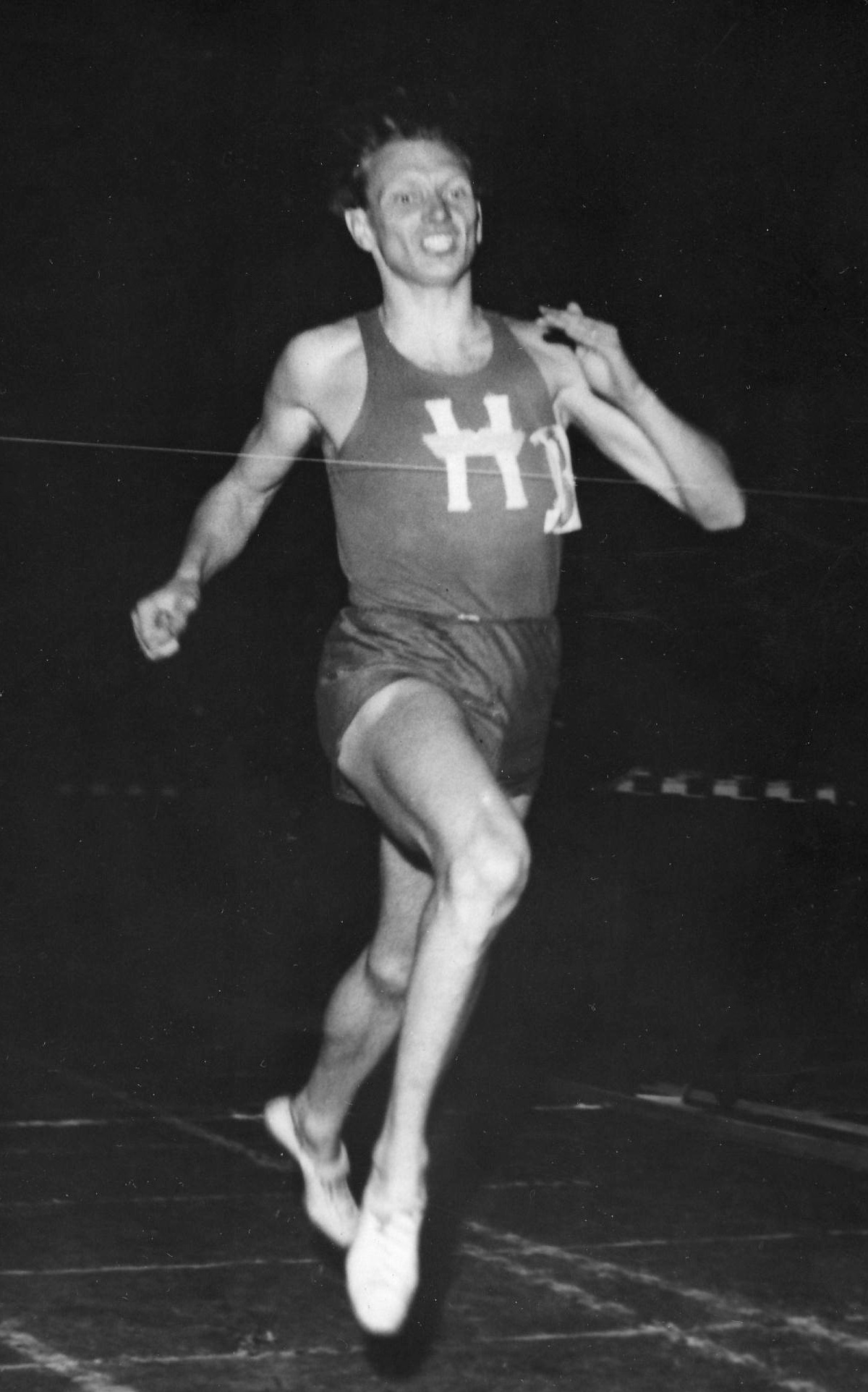 Arne Andersson